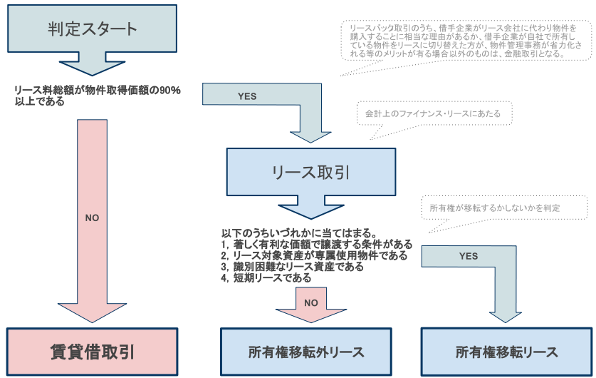 税務上のリース分類についてのフローチャートを、日本国法人税法を参考に作成。